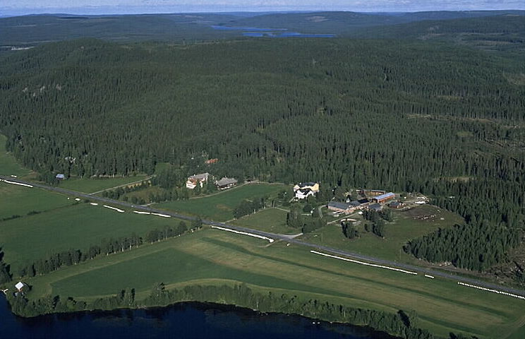 Motiv: Strånäset Nyckelord: Flygbilder, Riksintressen Kategori: JordbruksbyStrånäset